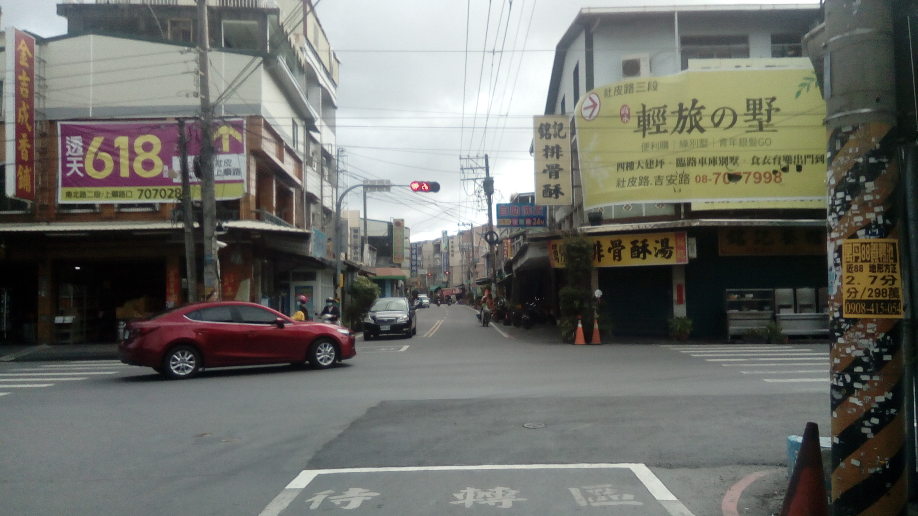 社皮大馬路口